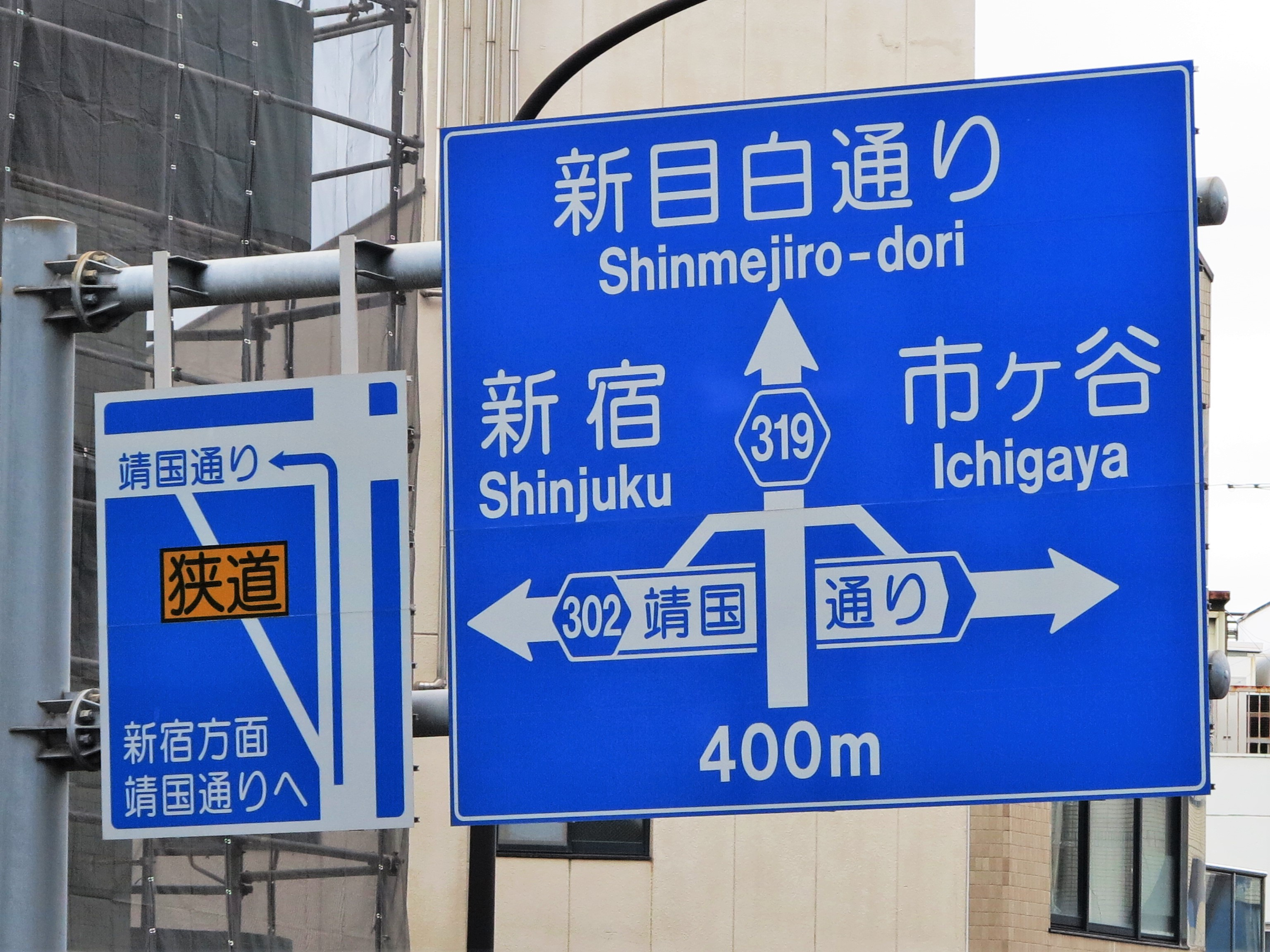 抜け道を使用しないよう求める合羽坂交差点の案内標識